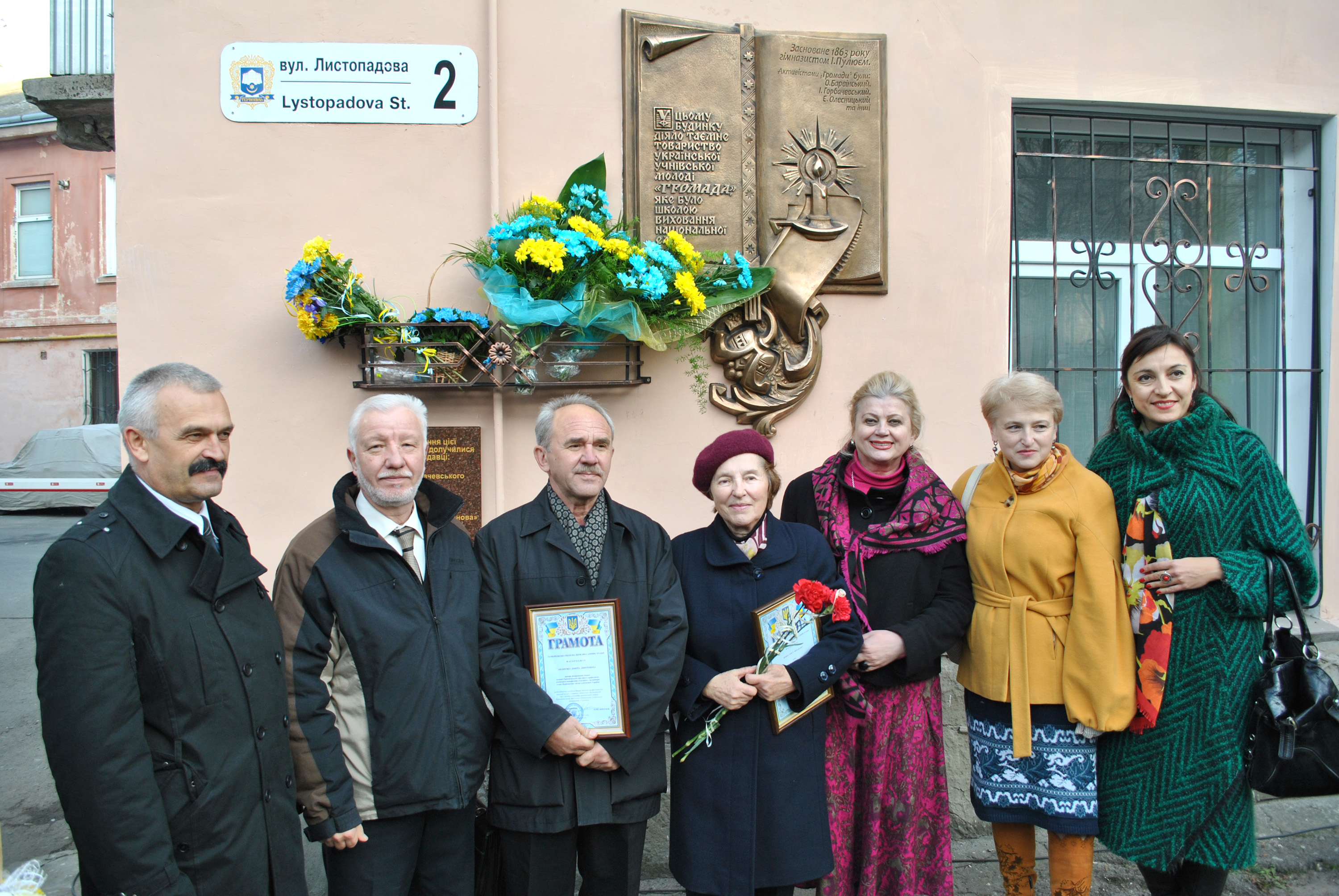 Відкриття першої в Україні меморіальної дошки членам товариства «Громада» на стіні будинку по вул. Листопадовій, 2 у Тернополі. Невідомий, архітектор Данило Чепіль, скульптор Дмитро Пилип'як, ініціаторка встановлення дошки Ольга Збожна, мистецтвознавець Віра Стецько, працівниці ТНТУ.